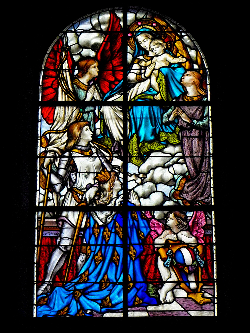 Vitrail patriotique de l'église Saint-Pierre de La Selle-en-Coglès (35).